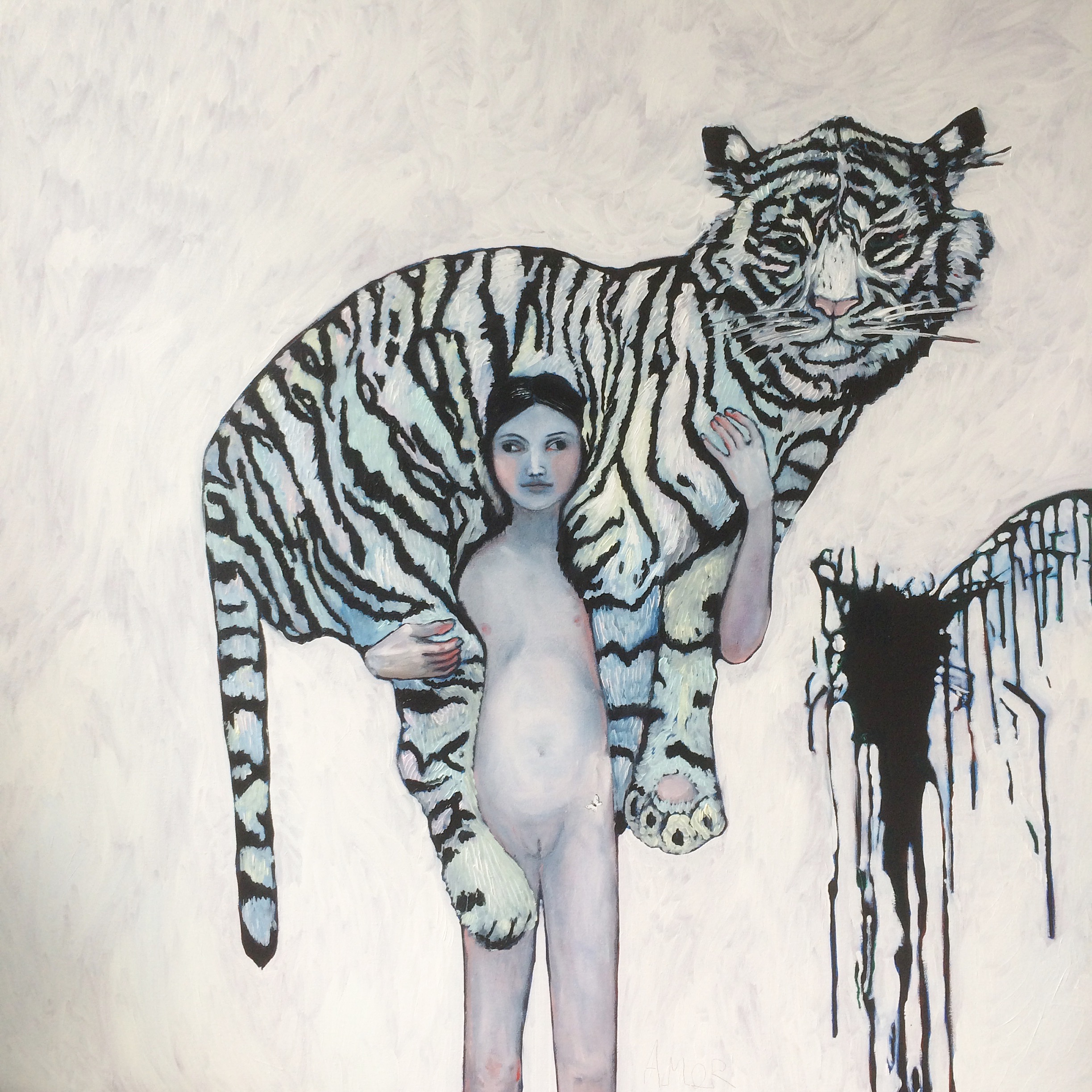 olja på duk, 150 x 150 cm, AK von Malmborg 2014